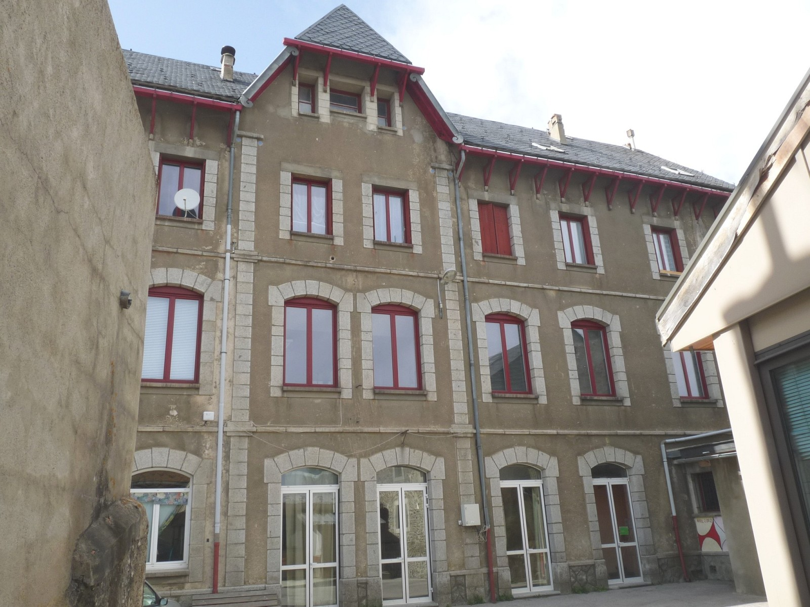 Ecole de Formiguères, Pyrénées-Orientales, France